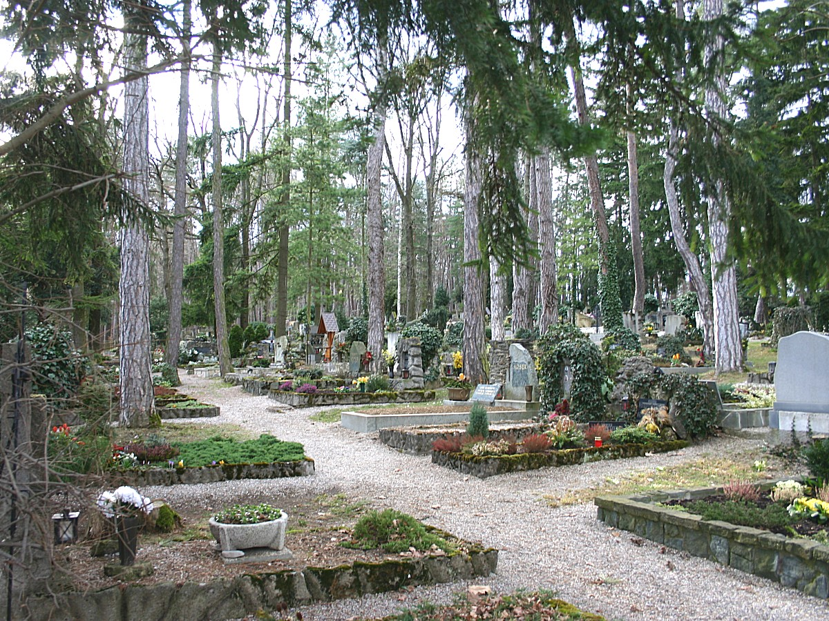 Erlach (Niederösterreich) Waldfriedhof